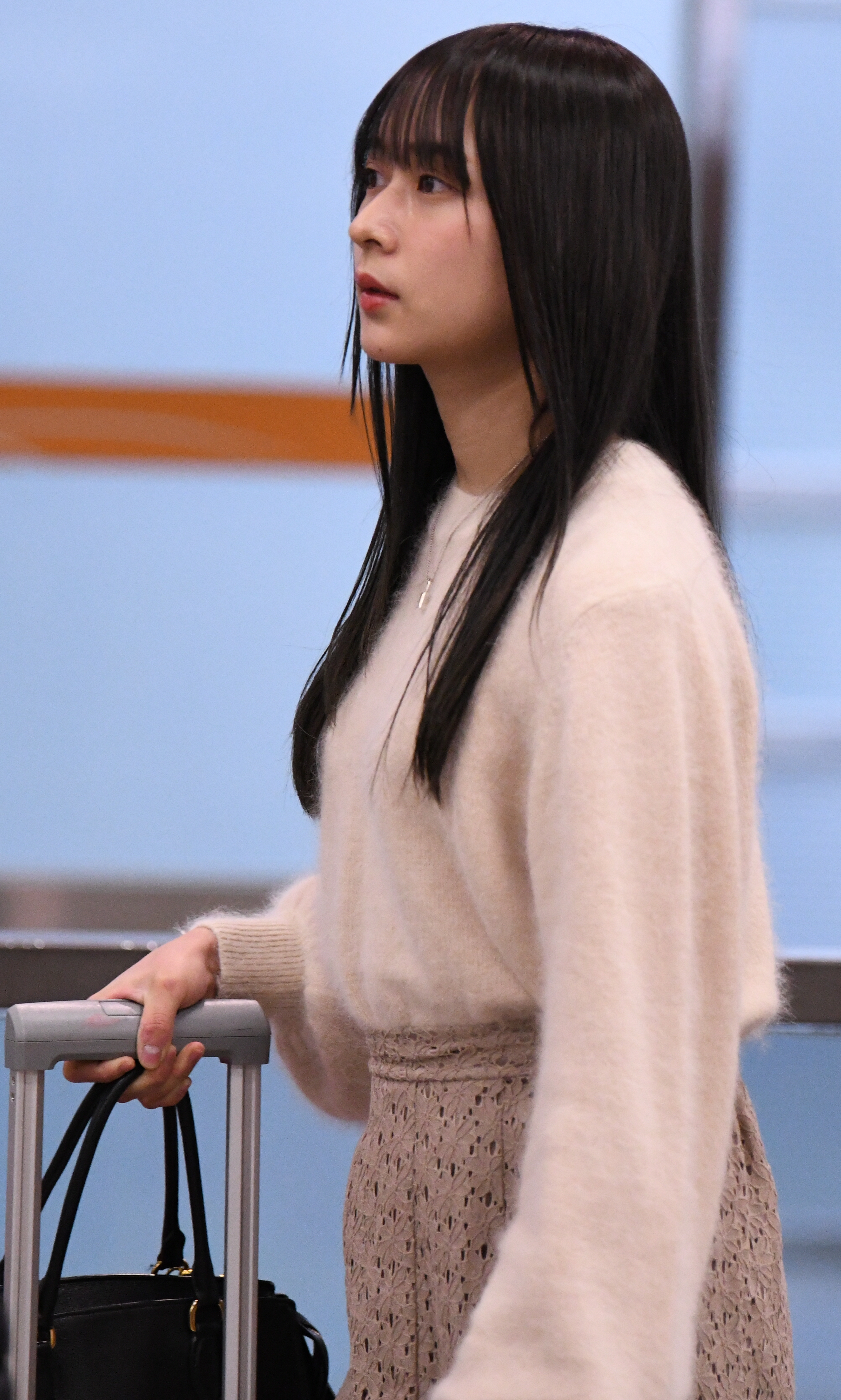 2020.01.18 乃木坂46「NOGIZAKA46 Live in Taipei 2020」抵達台灣@台北松山機場